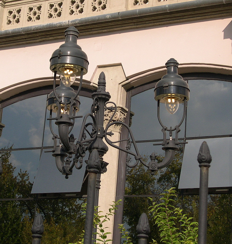 Gázlámpa Budapesten, Gázművek udvara, Köztársaság tér